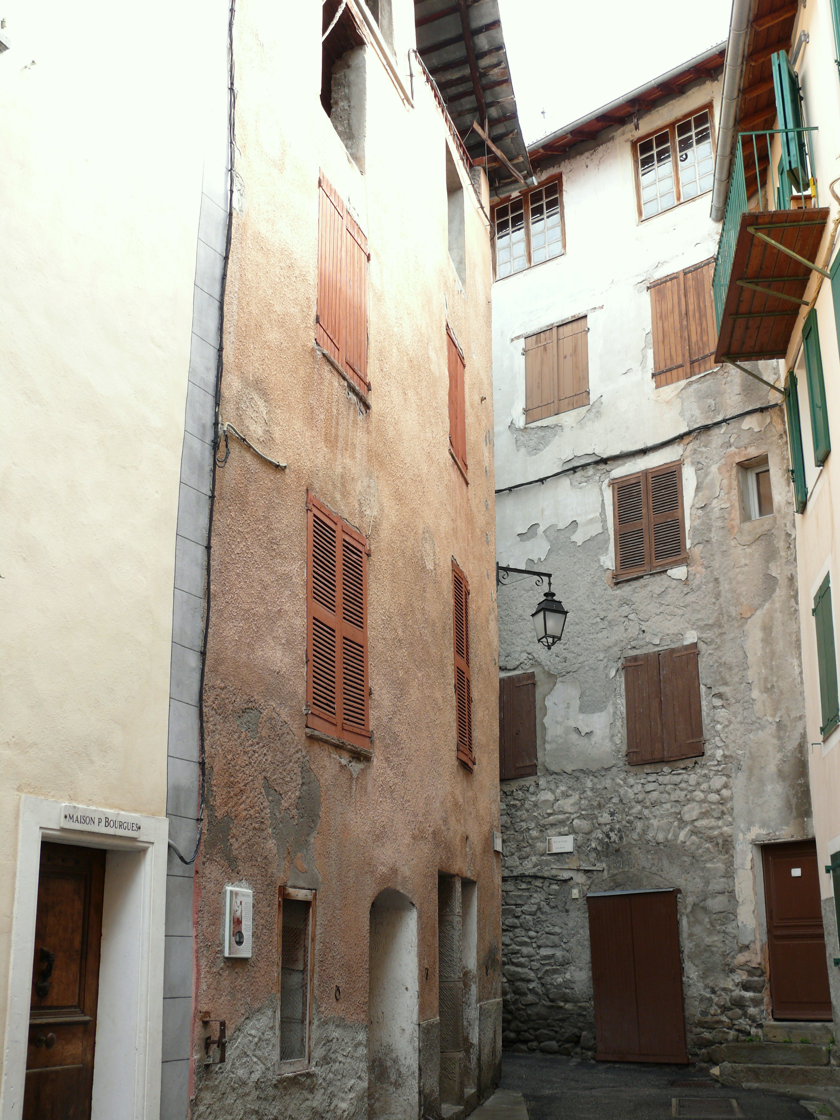 Colmars - Rue de Goin et maison Bourgues